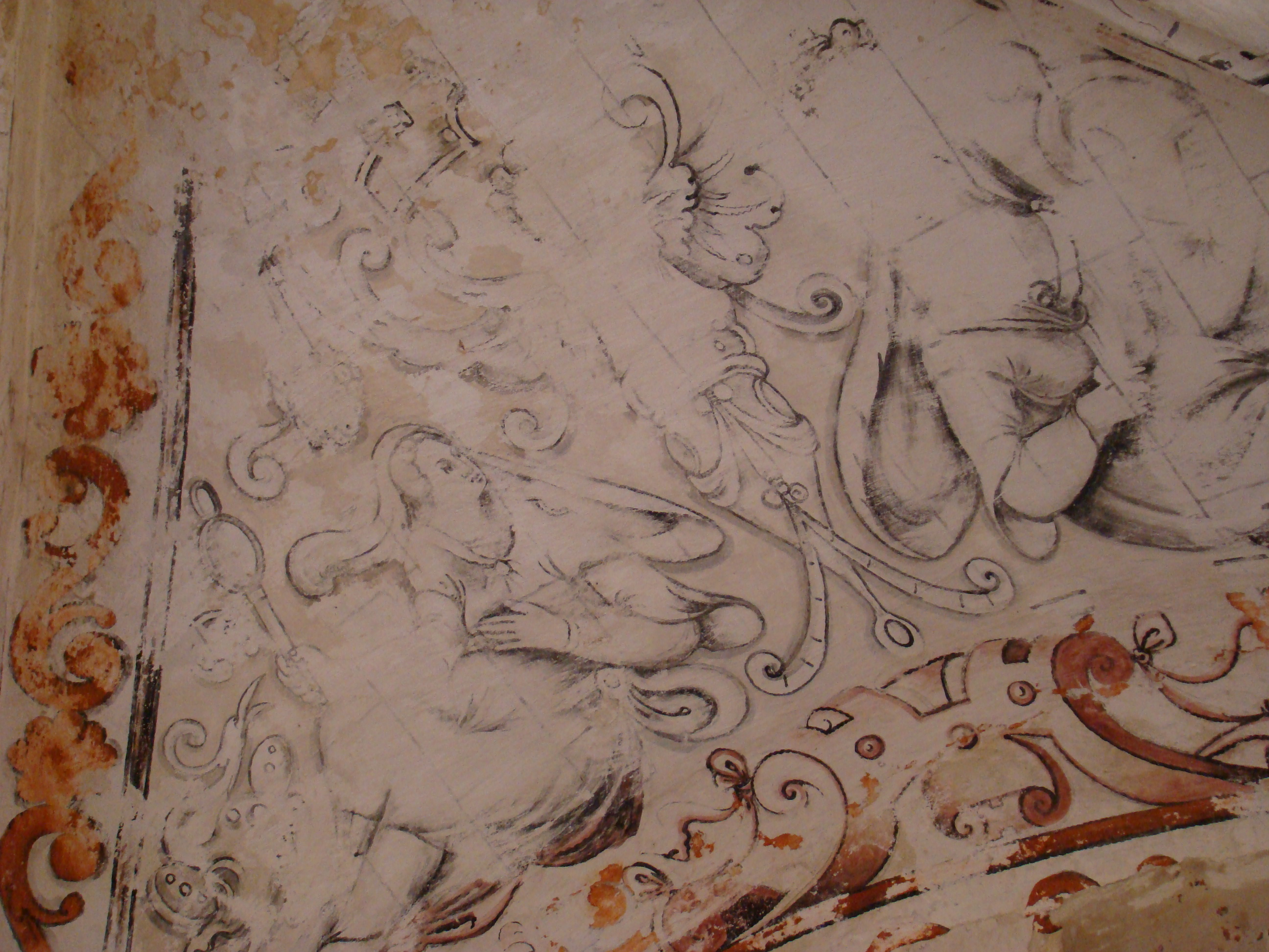 Valbuena de Duero, Valladolid, España. Claustro del monasterio de Santa María de Valbuena. Pinturas murales en una de las pandas.